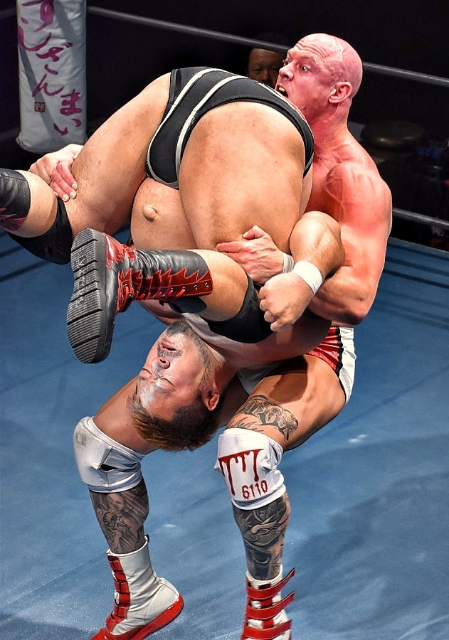 プロレスラーのクリス・ヴァイスによるパッケージパイルドライバー